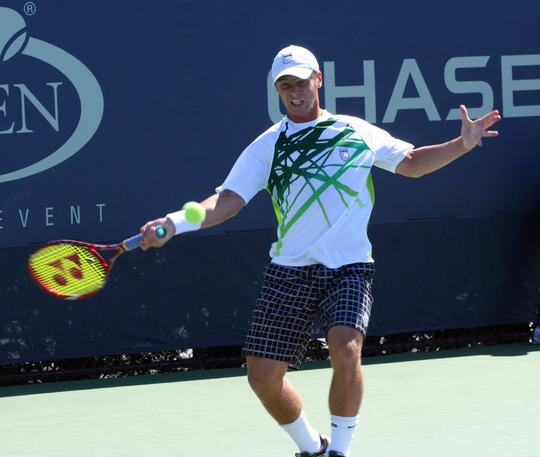 U.S. Open Aug. 30, 2010